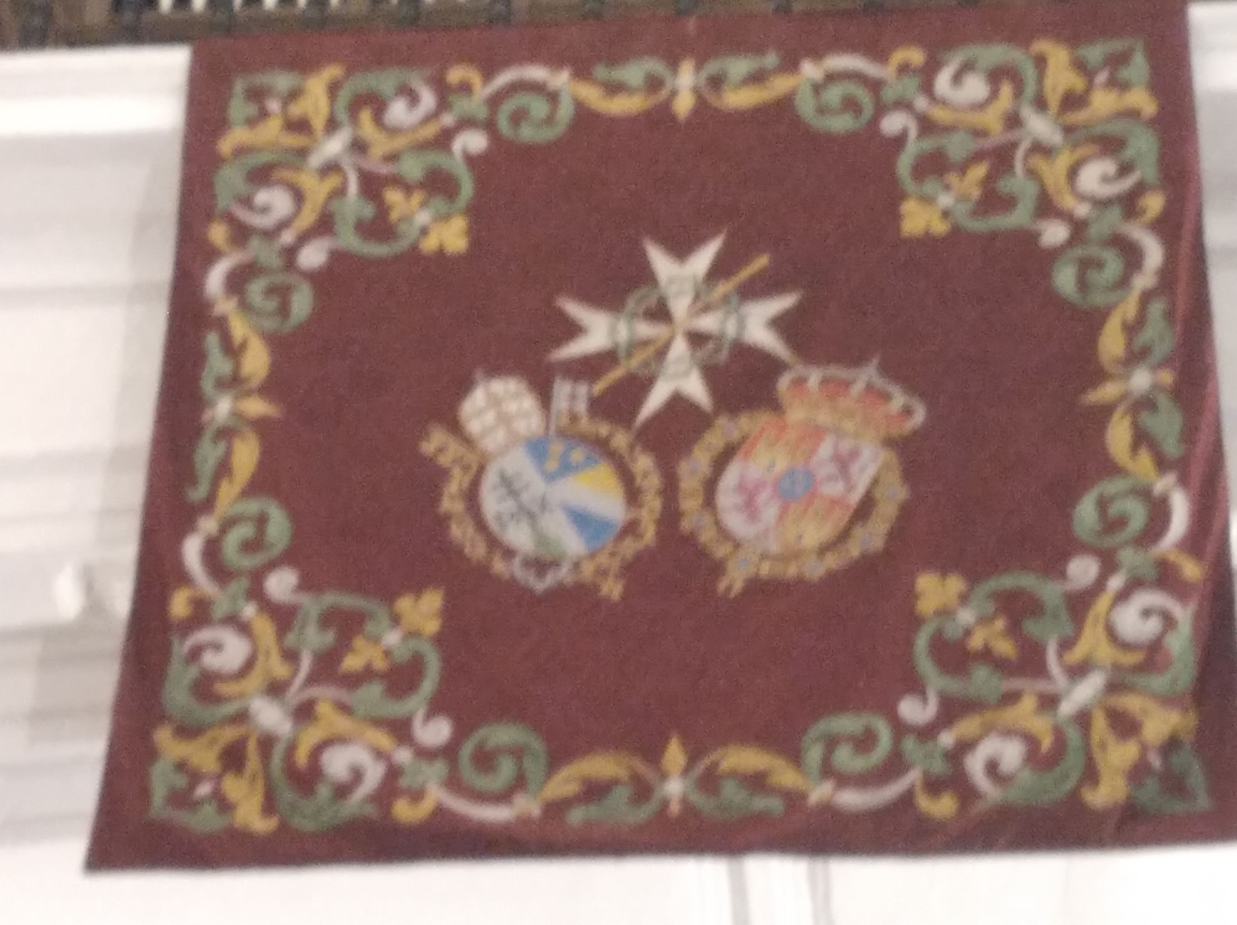 Escudo de la hermandad del Valle de Sevilla en 2020.